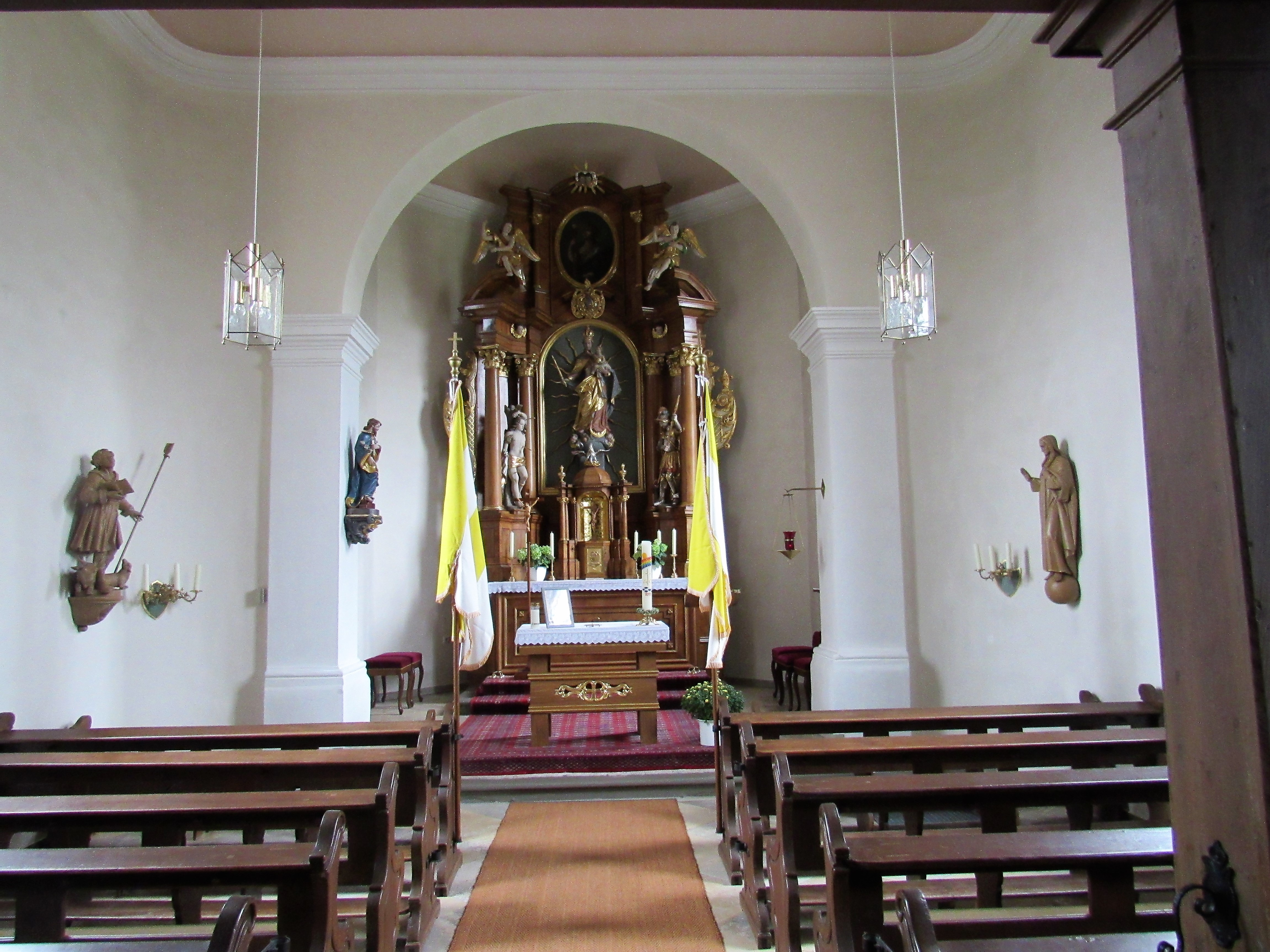 Inneres der Kirche in Hetzlos